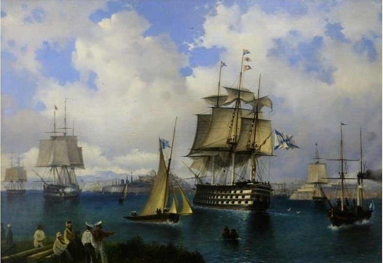 А. П. Боголюбов «Севастополь», 1846 год. На картине изображён 120-пушечный линейный корабль «Три Святителя»